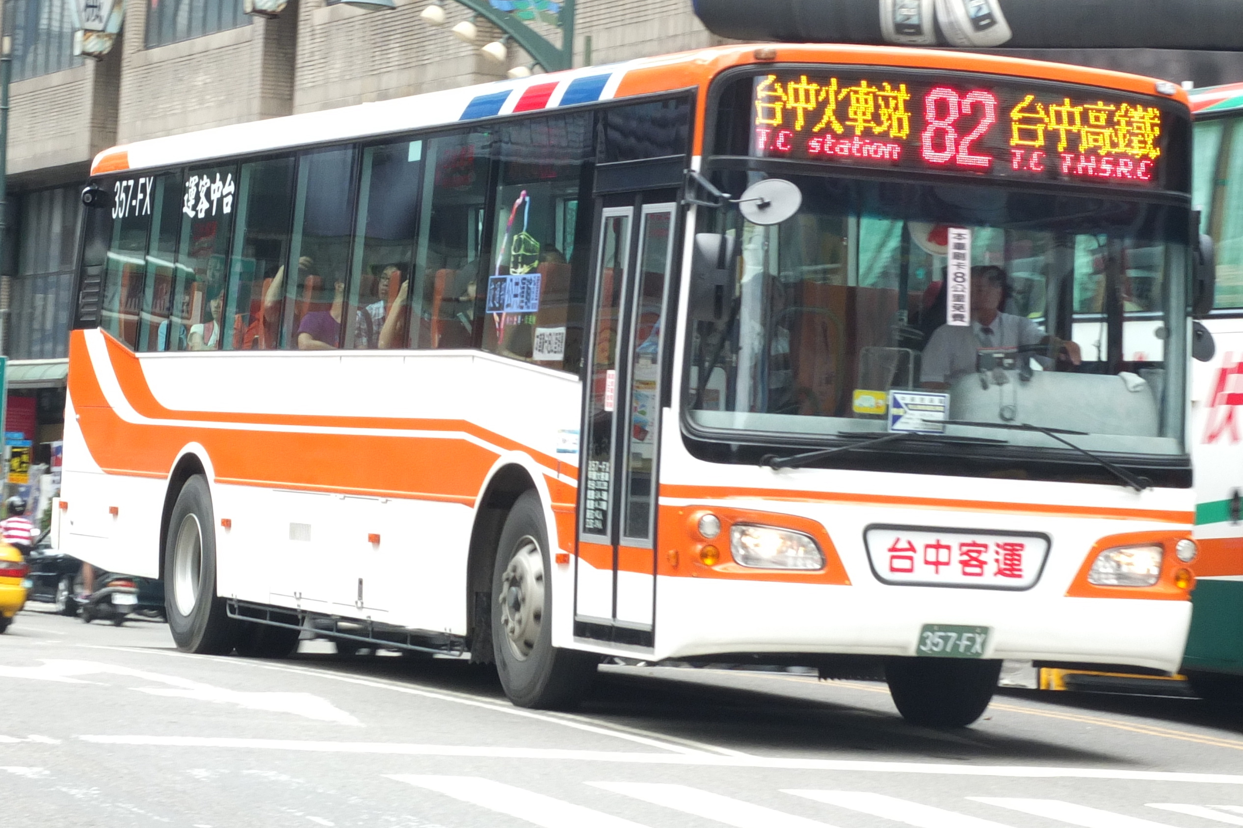 台中客運 357-FX 營運台中市公車 82 路，行駛於台中市臺灣大道一段（中區中正路）。本車為 HINO RK8JRSA 馨盛車體。